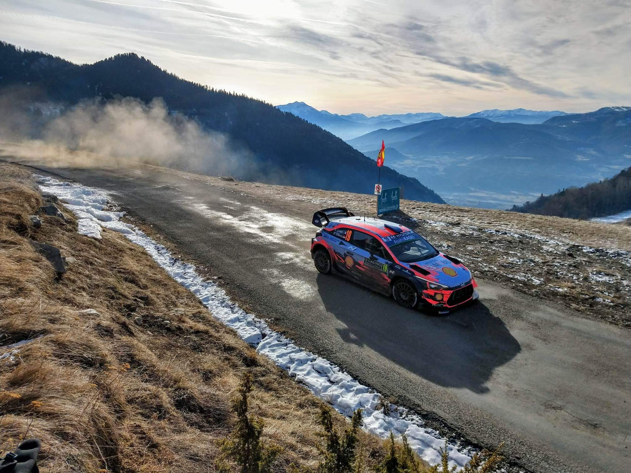 Hyundai i20 Coupe WRC de Sébastien Loeb au Rallye Monte-Carlo 2019.